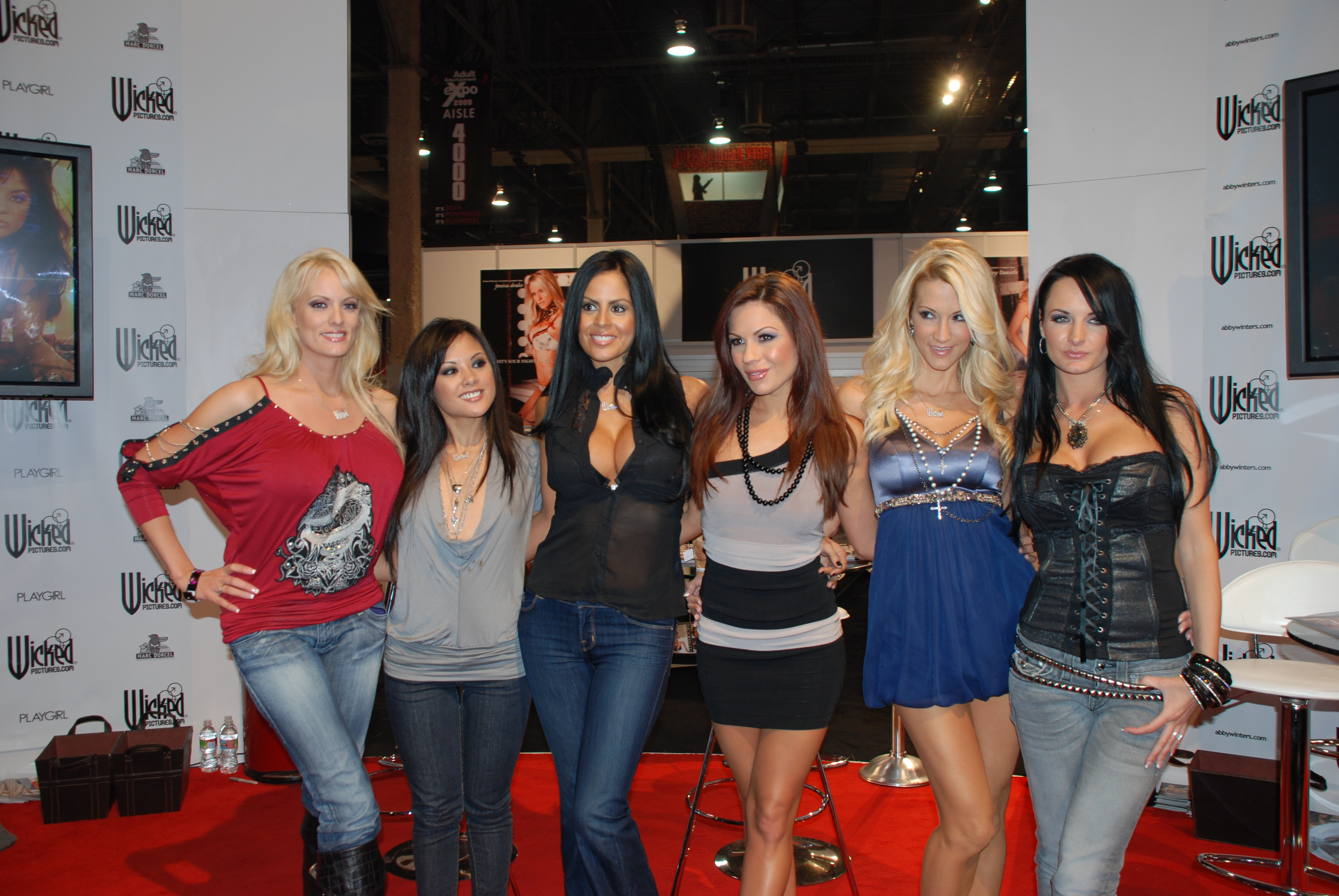 (L-R) Stormy Daniels, Kaylani Lei, Mikayla Mendez, Kirsten Price, Jessica Drake and Alektra Blue